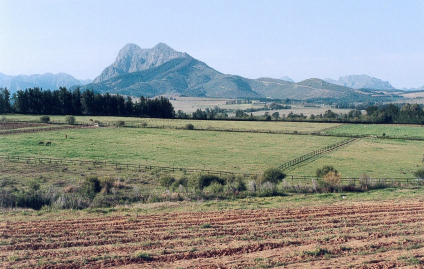 FC Georgio 1991 Paysages de la province du Cap (vallée des vignes)